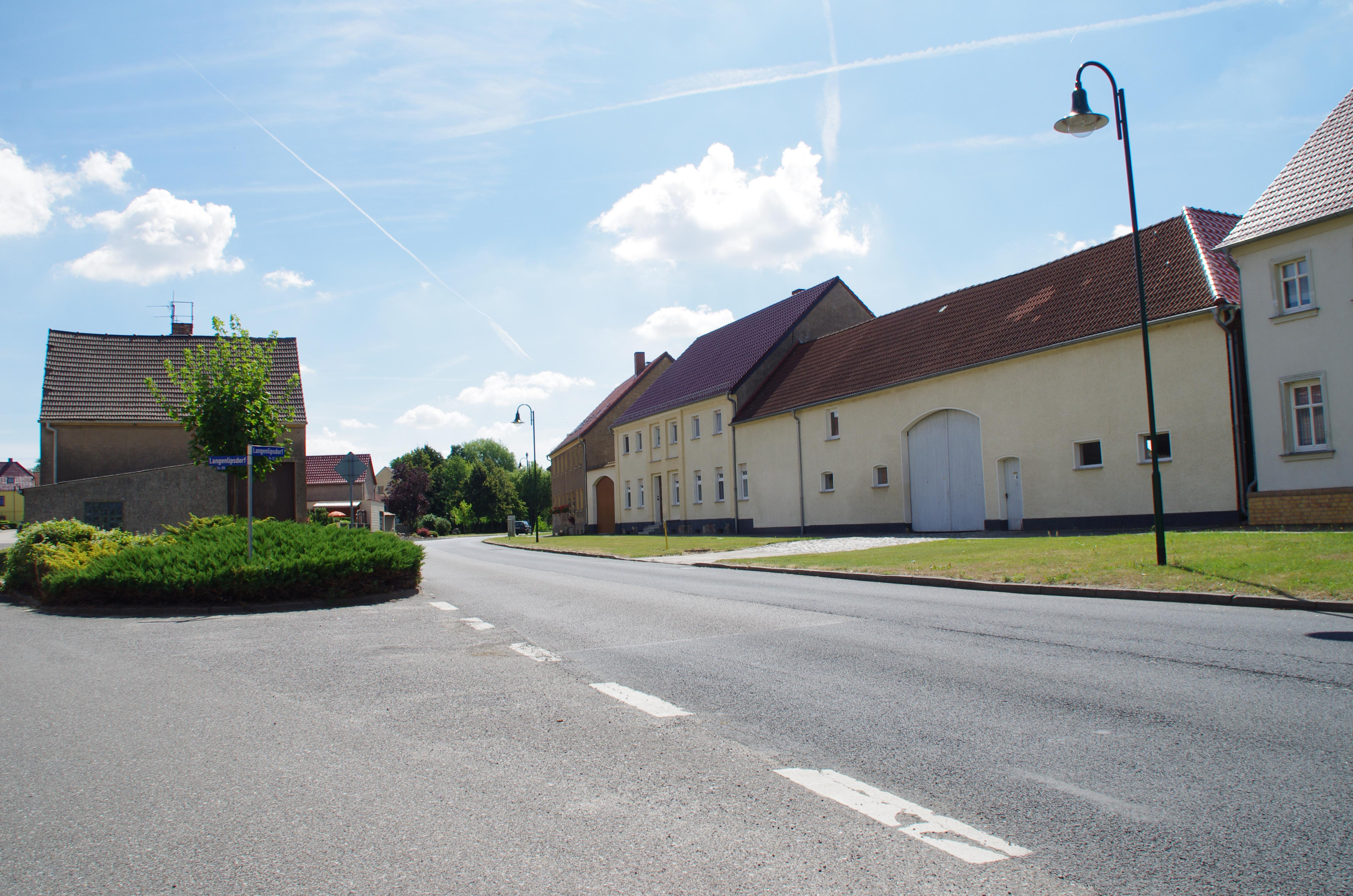 Niergörsdorf in Brandenburg. Das Dorf Langenlipsdorf ist ein Ortsteil von Niedergörsdorf.